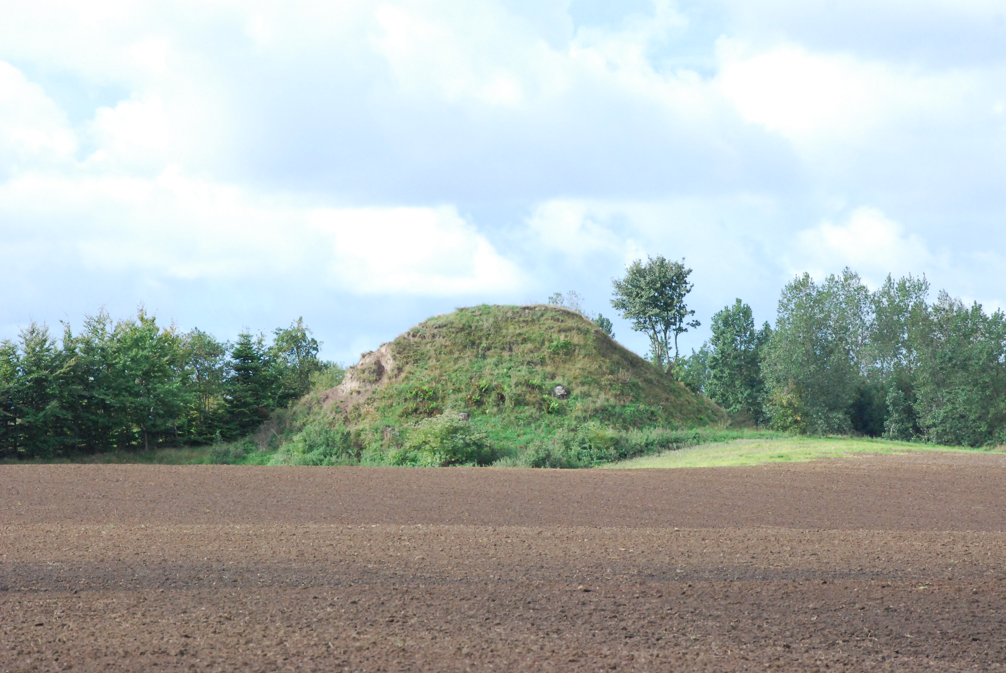 Gravhøjen Bavnehøj, Blistrup Sogn, Holbo Herred, Frederiksborg Amt, Danmark, fotograferet fra nordøst.